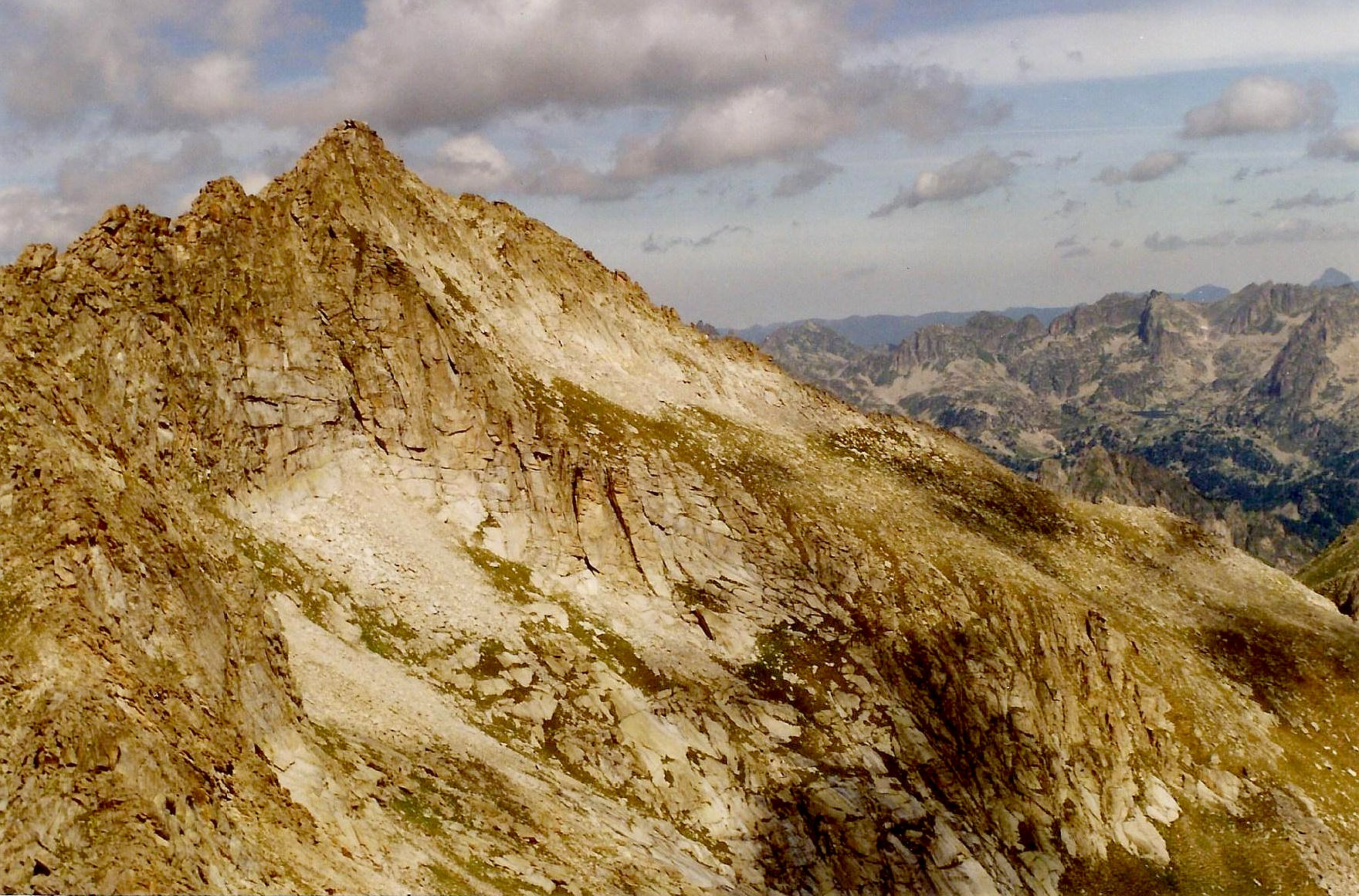 El Pic de Peguera des del Tuc de Saburó. La Torre de Cabdella (Pallars Jussà - Catalunya) (foto escanejada)